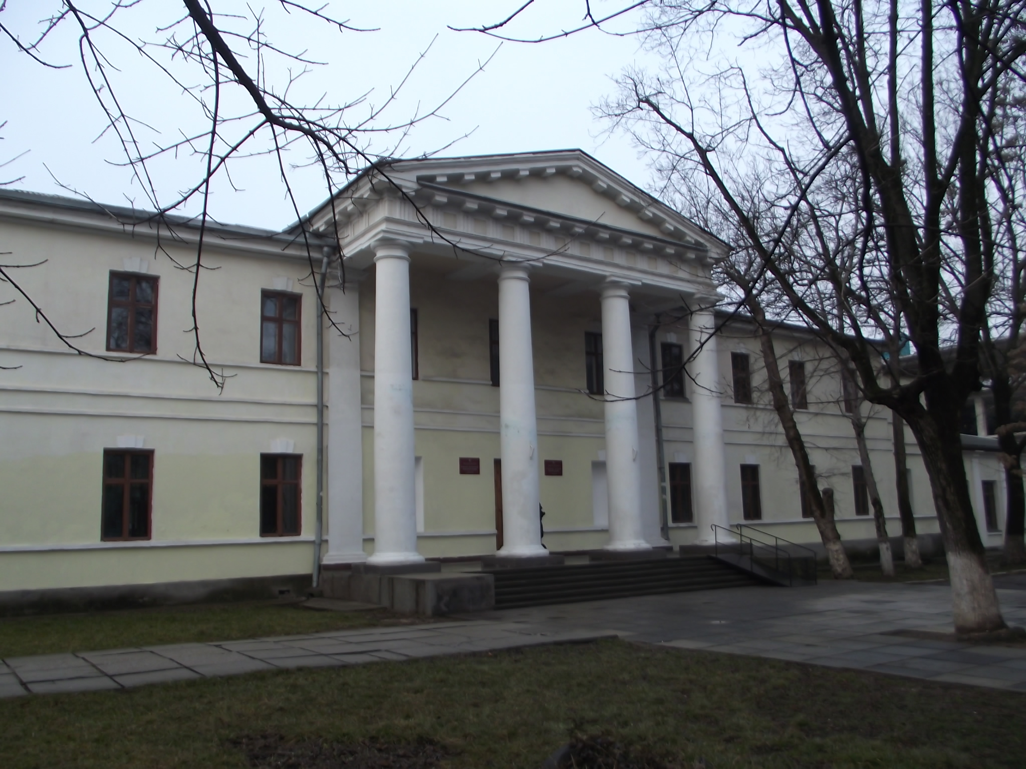 Колишній прочан будинок А. С. Таранова-Белозерова, Сімферополь, вул. К. Маркса, 28/10, літер «А», «Б», «С»